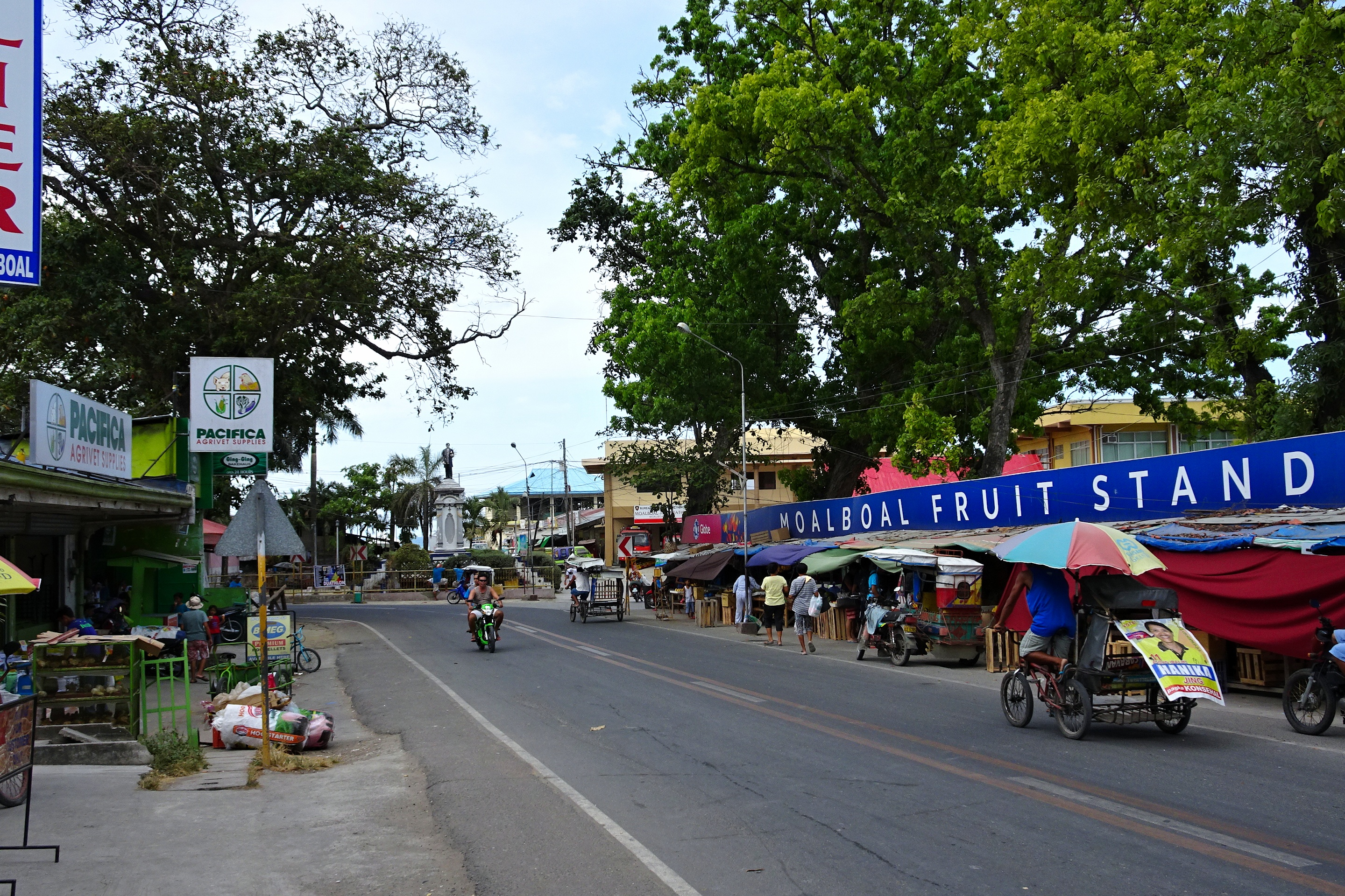 Moalboal, Cebu, Philippines